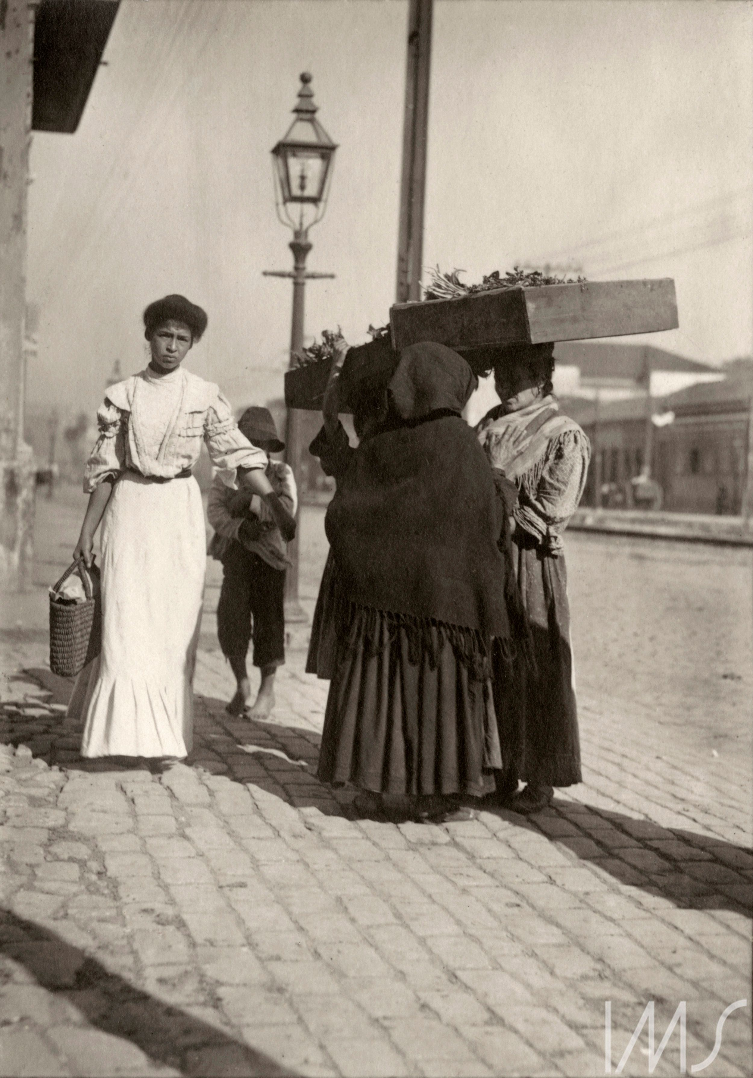 Proximidades do atual parque D. Pedro II